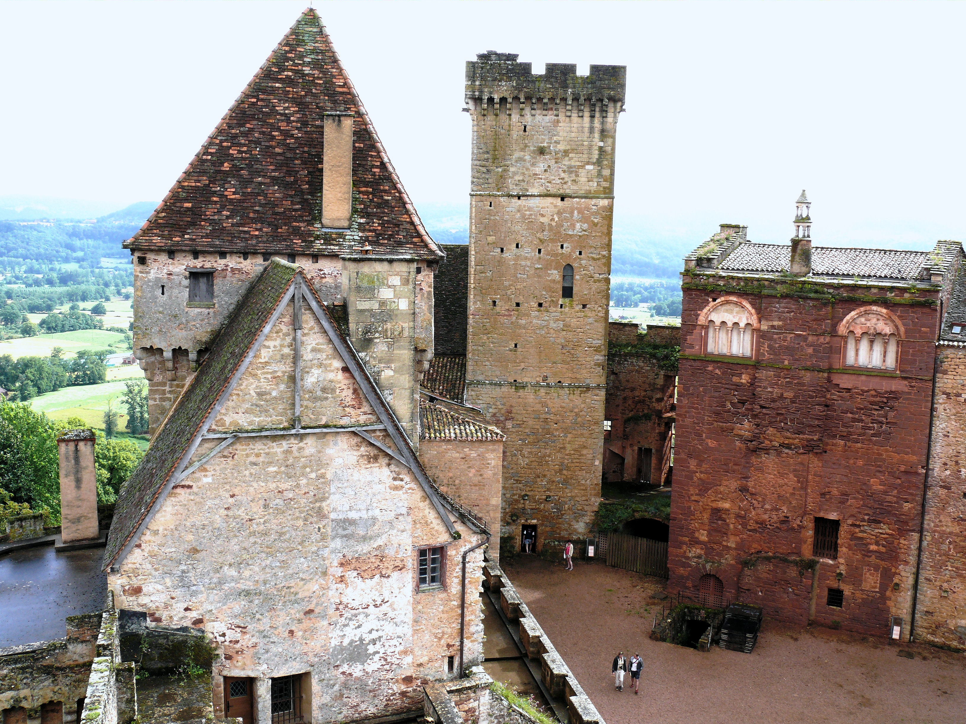 Château de Castelnau-Bretenoux - Bâtiments autour de la cour du château